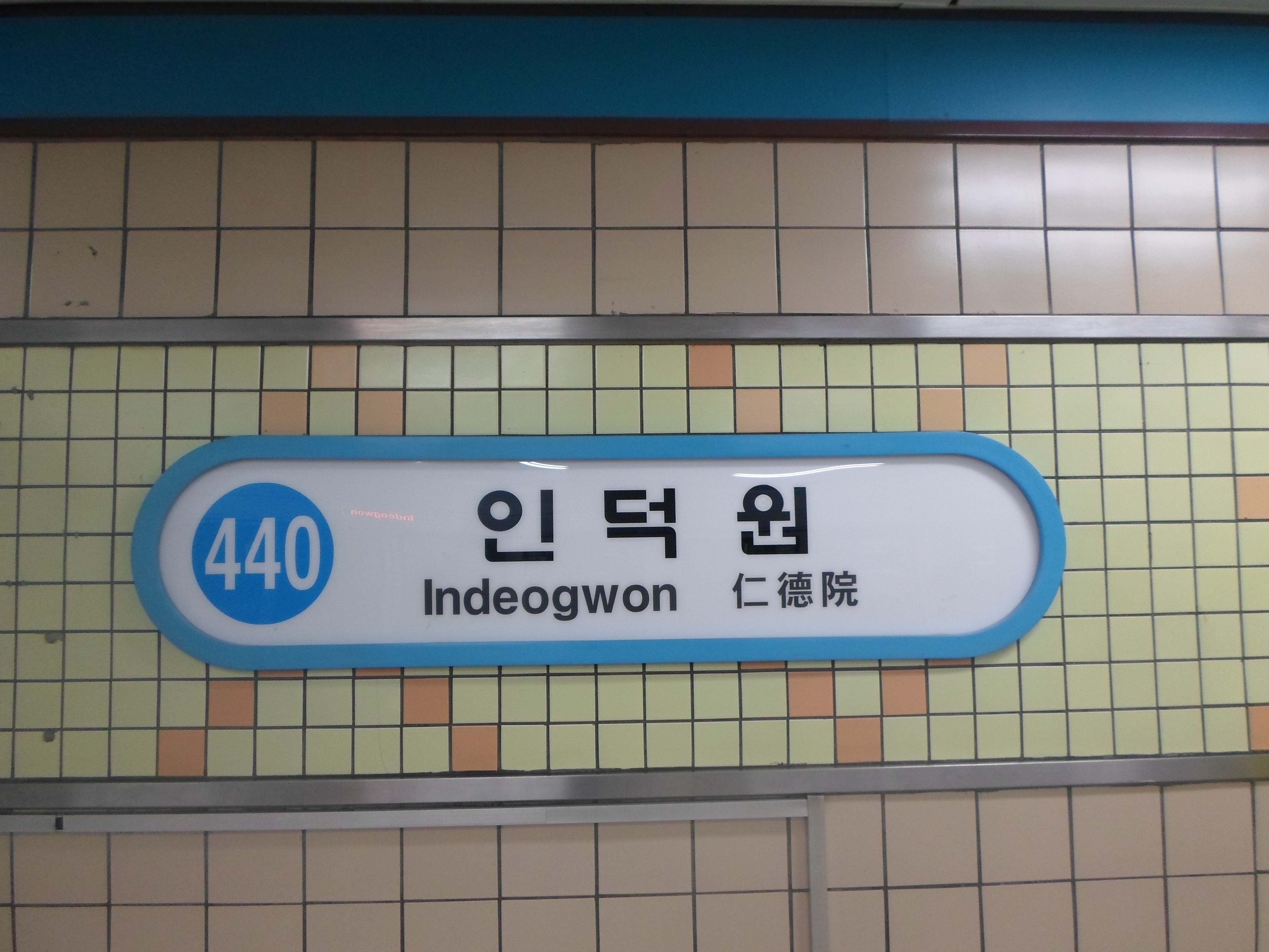 인덕원역 역명판